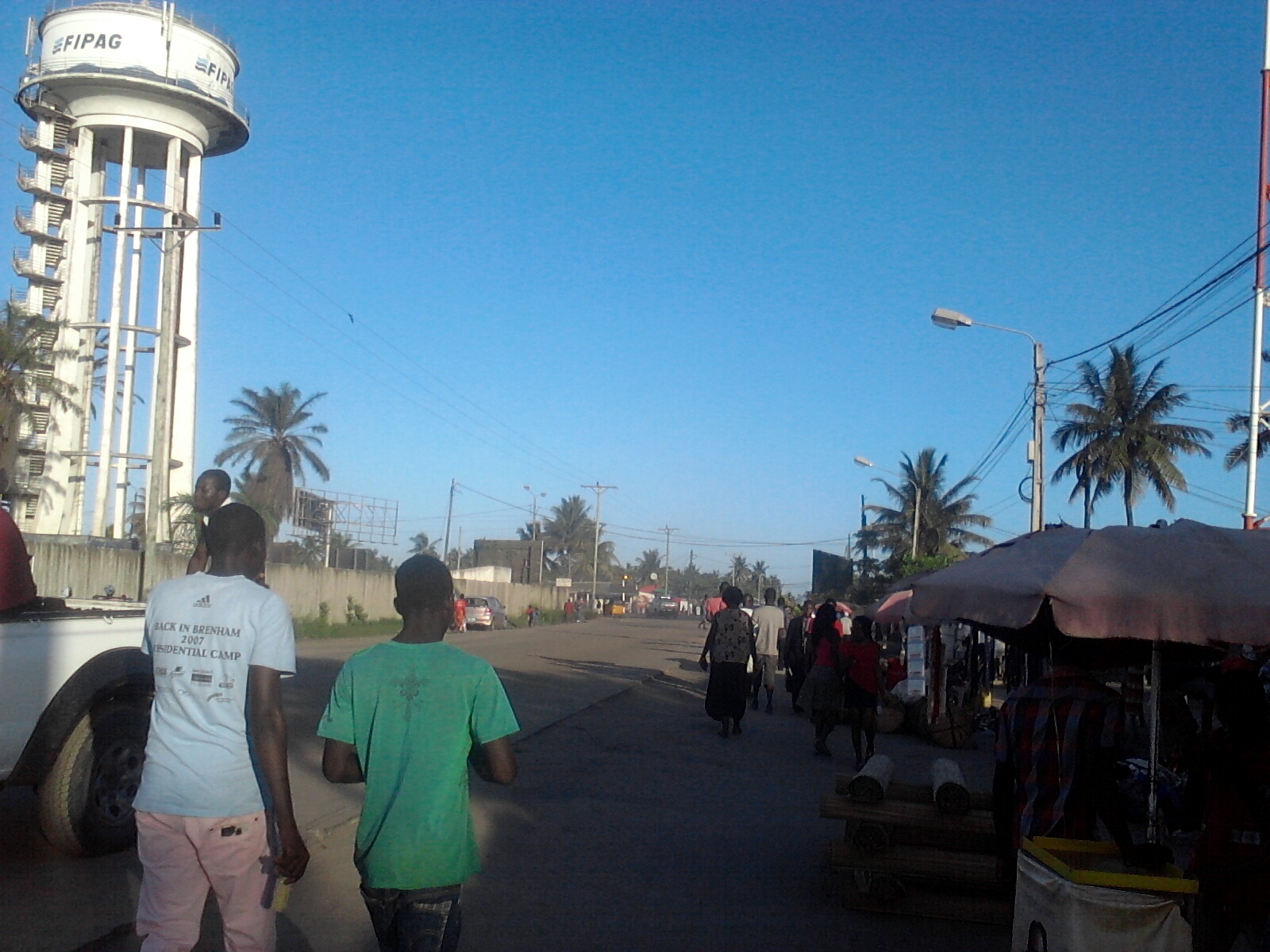 Essa imagem representa a zona periférica da Munhava-Central, vista observada do lado esquerdo da rua Kruss Gomes para o trânsito da zona incluindo a FIPAG. Esta obra destina-se para o uso da matéria que retrata da Munhava na Wikipedia.